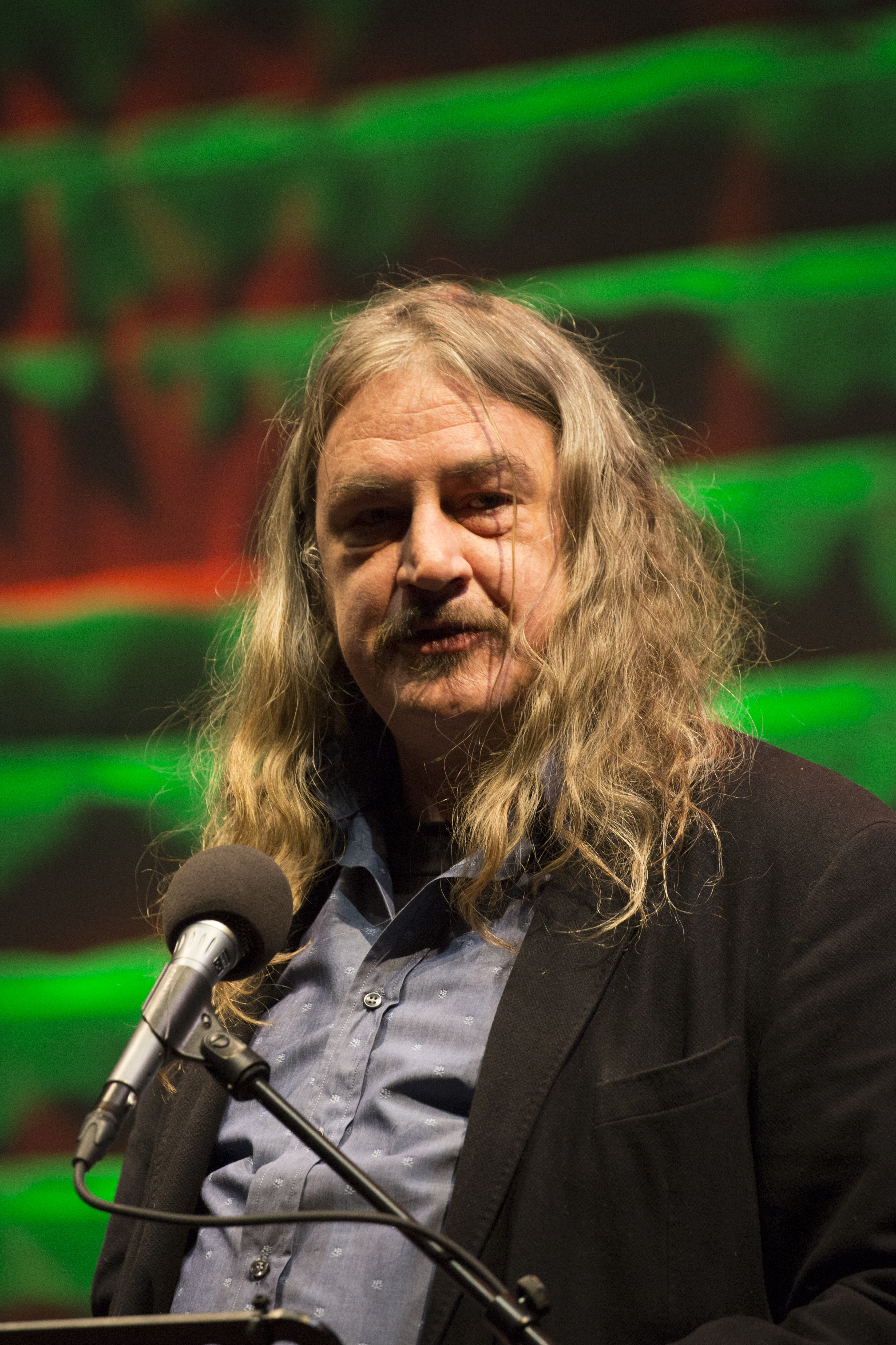 Ilja Pfeijffer - Schrijversfeest - Winternachten 2016 Schrijversfeest Theater aan het Spui, Den Haag, Nederland